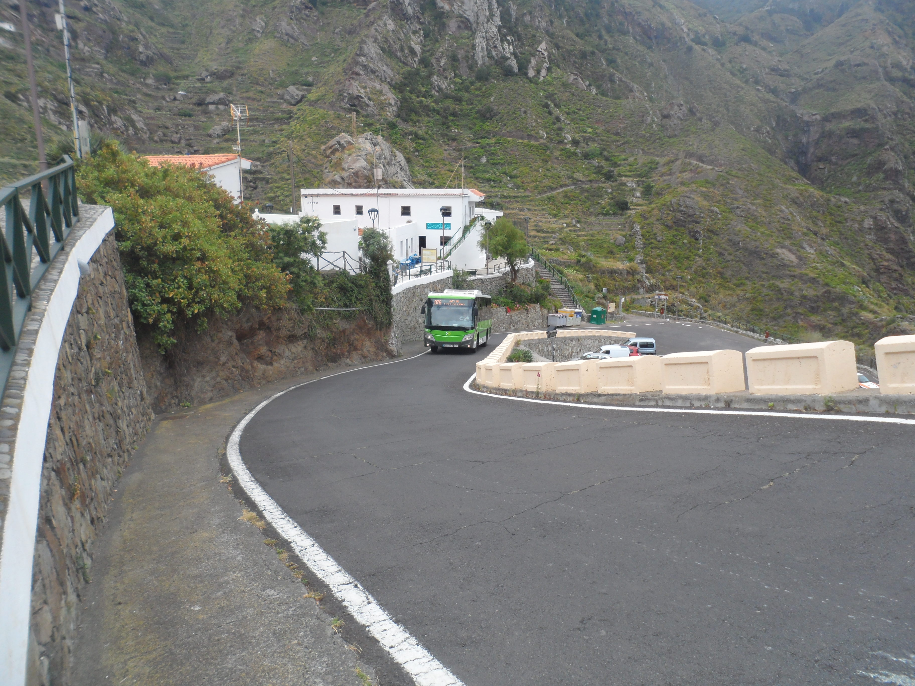 Linea de Titsa 076 trayecto Afur.